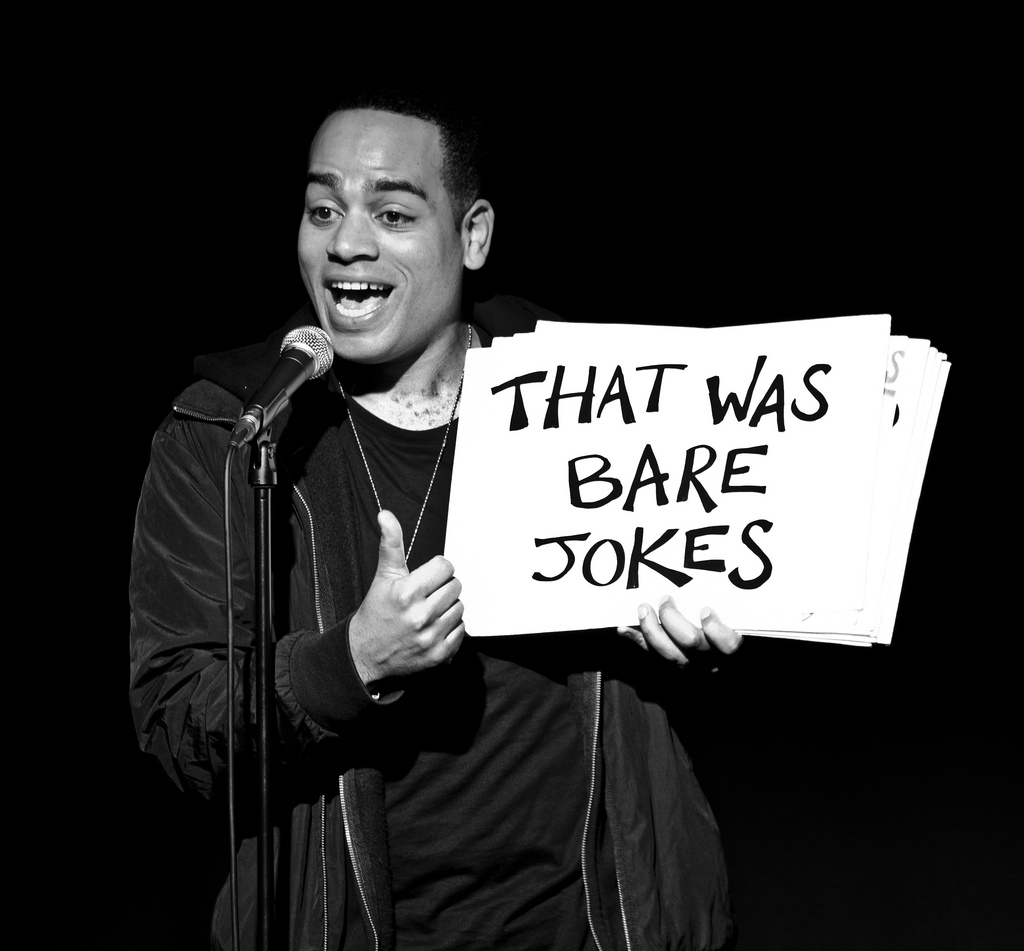 Doc Brown